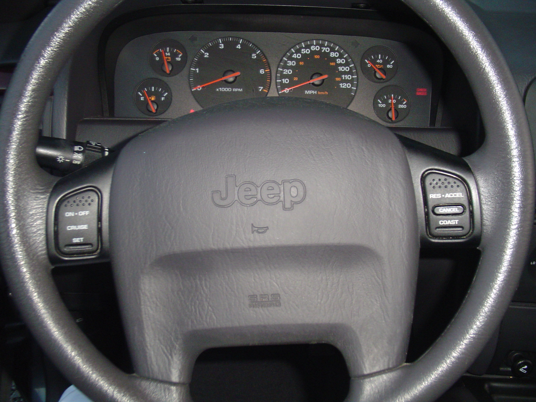 2000 Jeep Grand Cherokee Laredo Steering Wheel